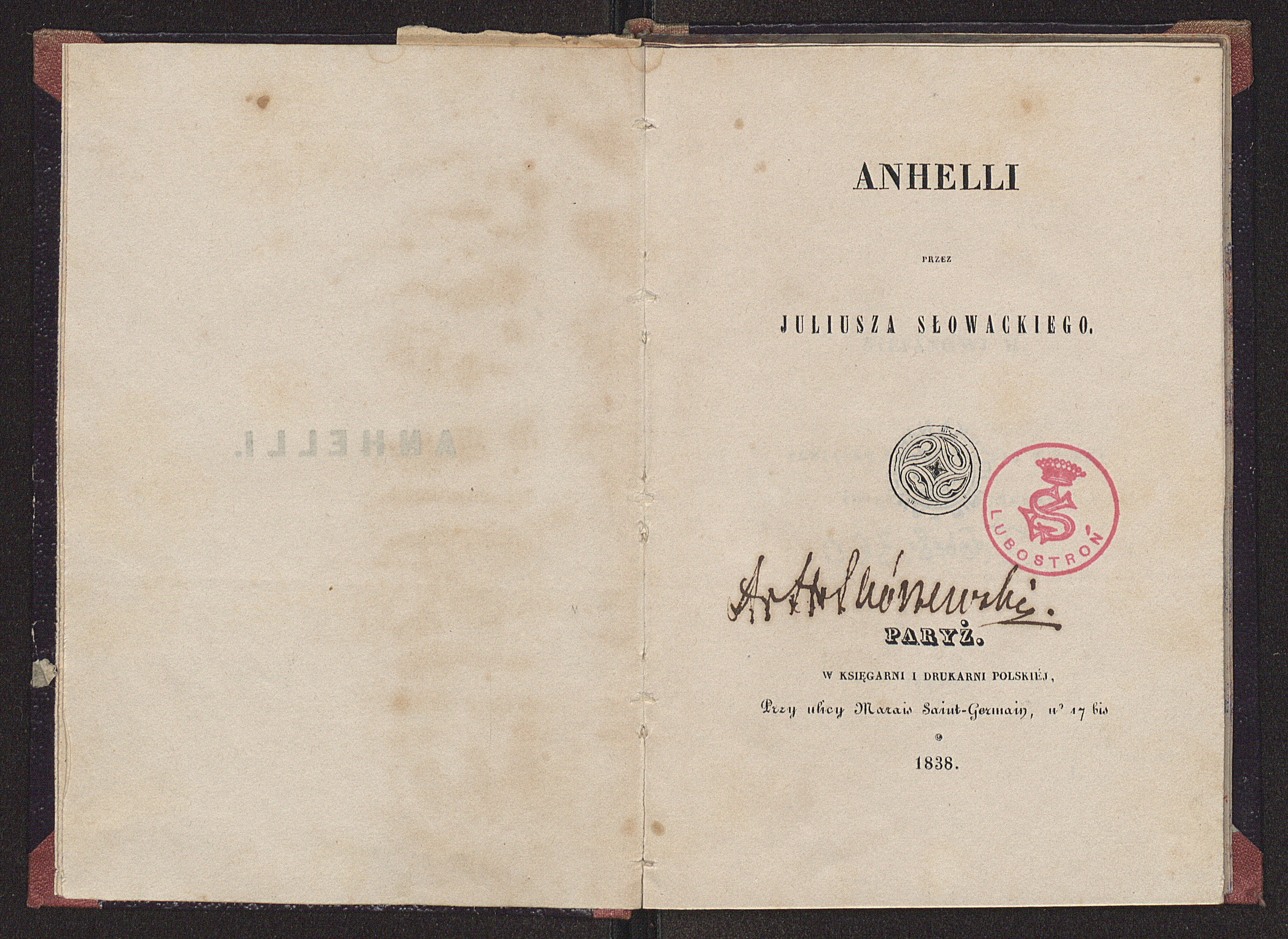 Strona tytułowa pierwodruku poematu Juliusza Słowackiego "Anhelli"